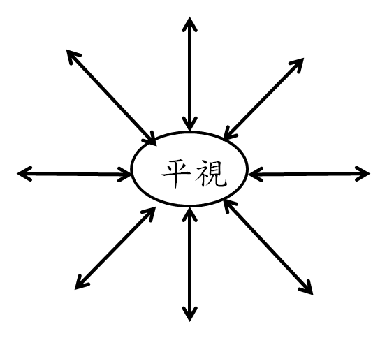 中文（台灣）: 擴大視野練習